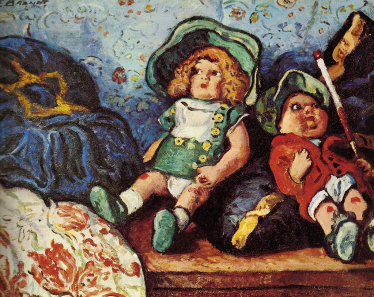 Muñecas, óleo sobre lienzo, 54,5 x 72 cm, Caracas, Colección FMN-GAN